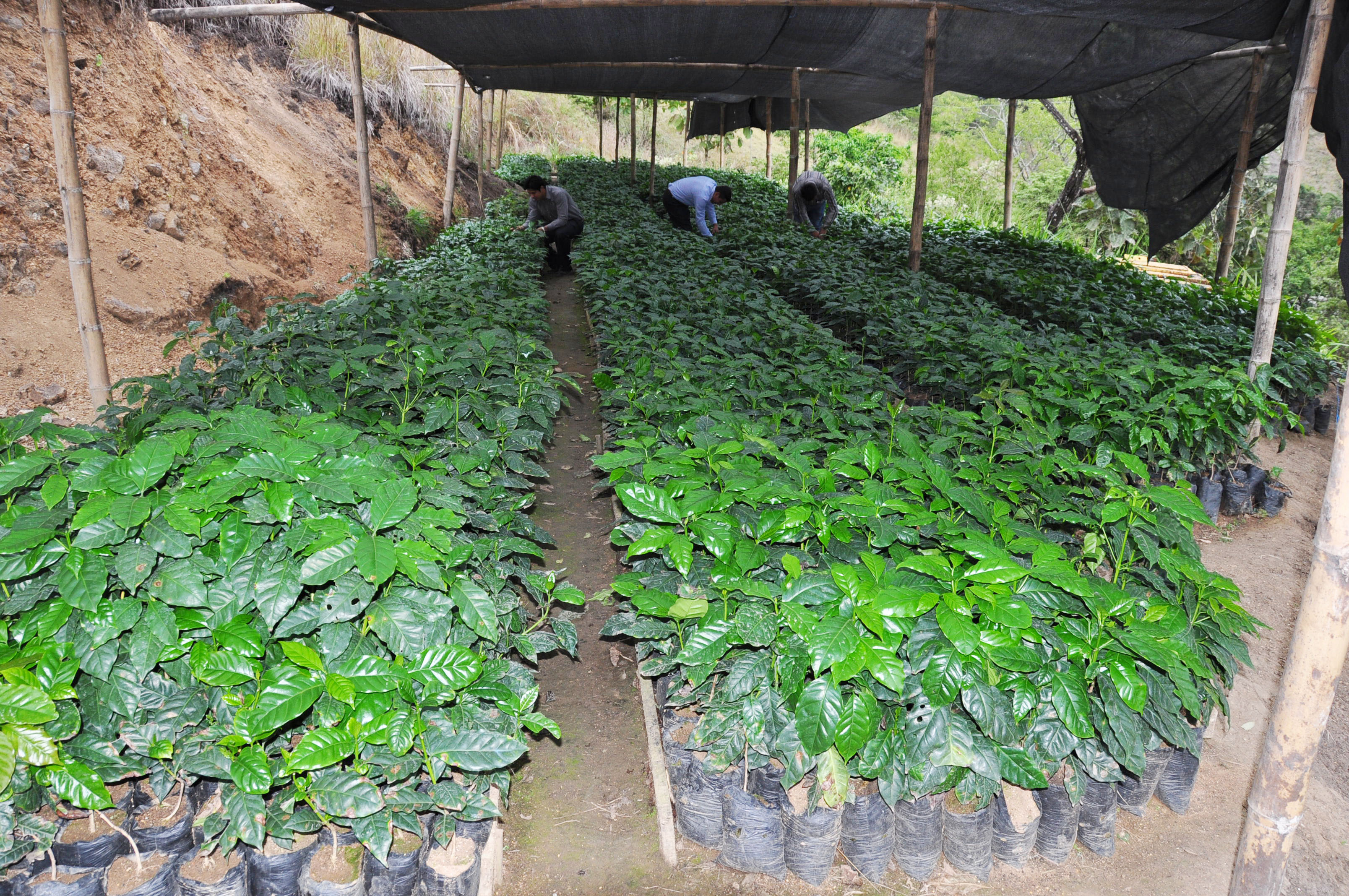 50 vivero plantas de café